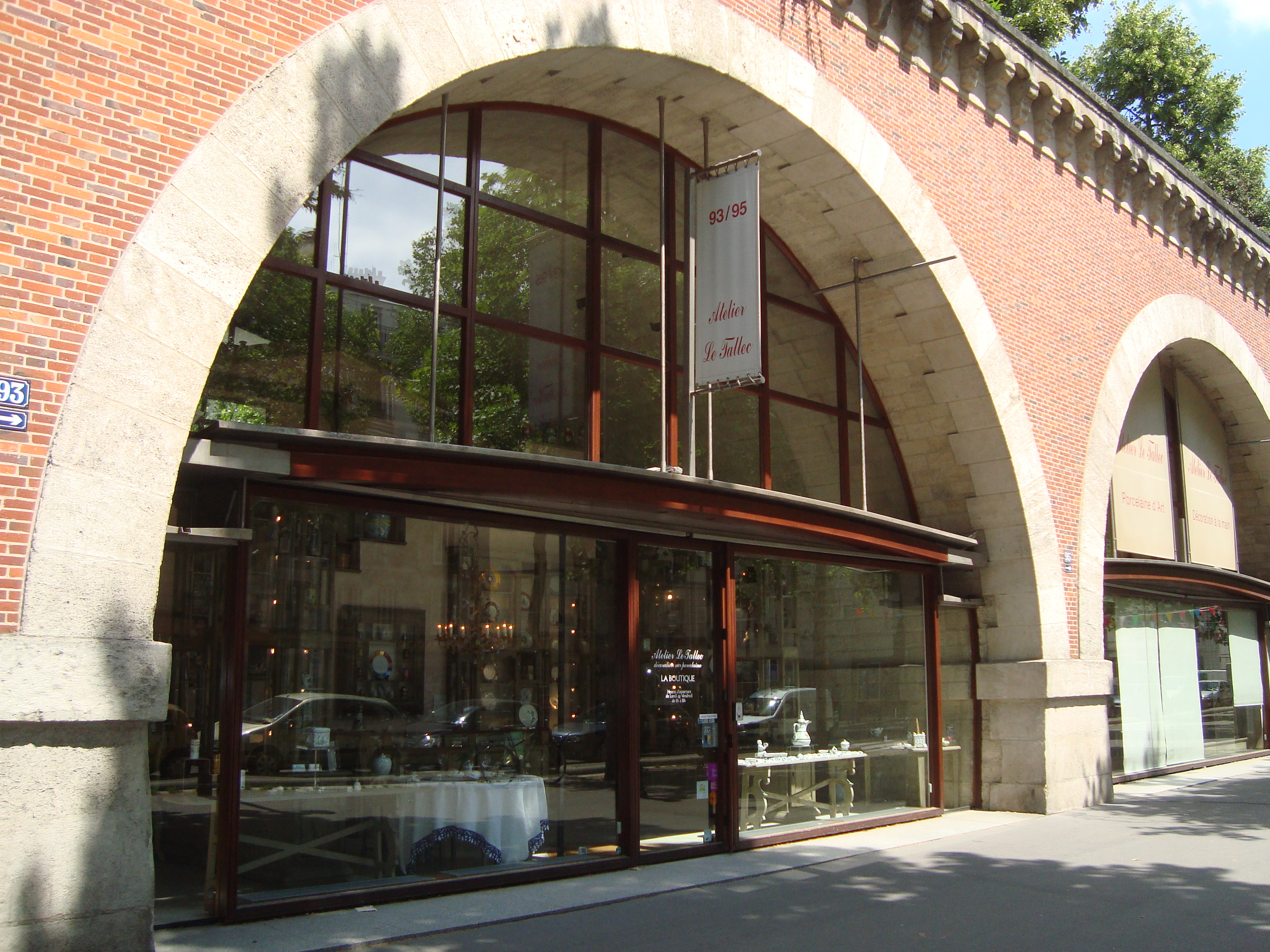 View of the Atelier Camille Le Tallec at the Viaduc des Arts, avenue Daumesnil, Paris